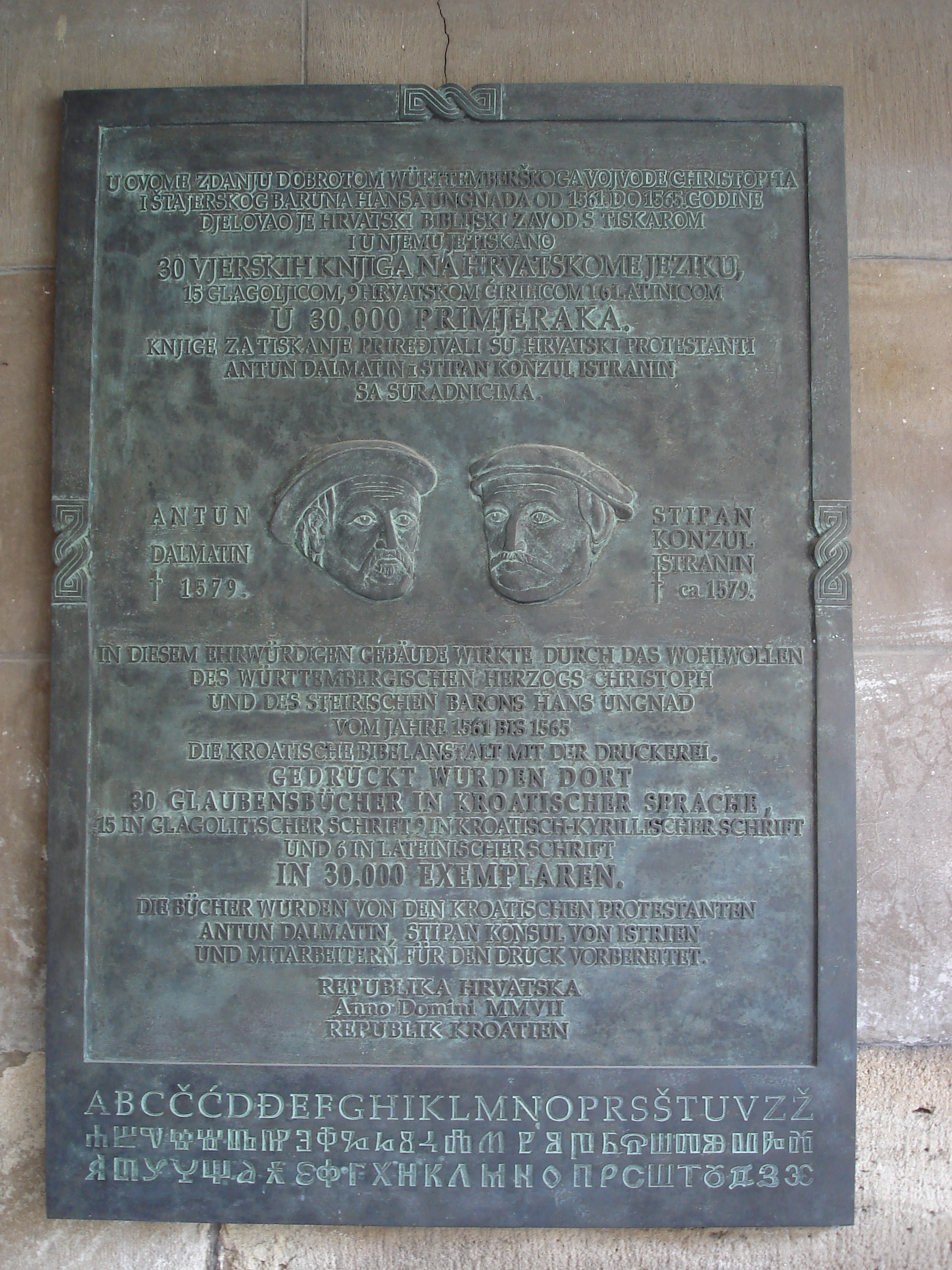 Gedenktafel für Primus Trubers Mitarbeiter im Uracher Stift